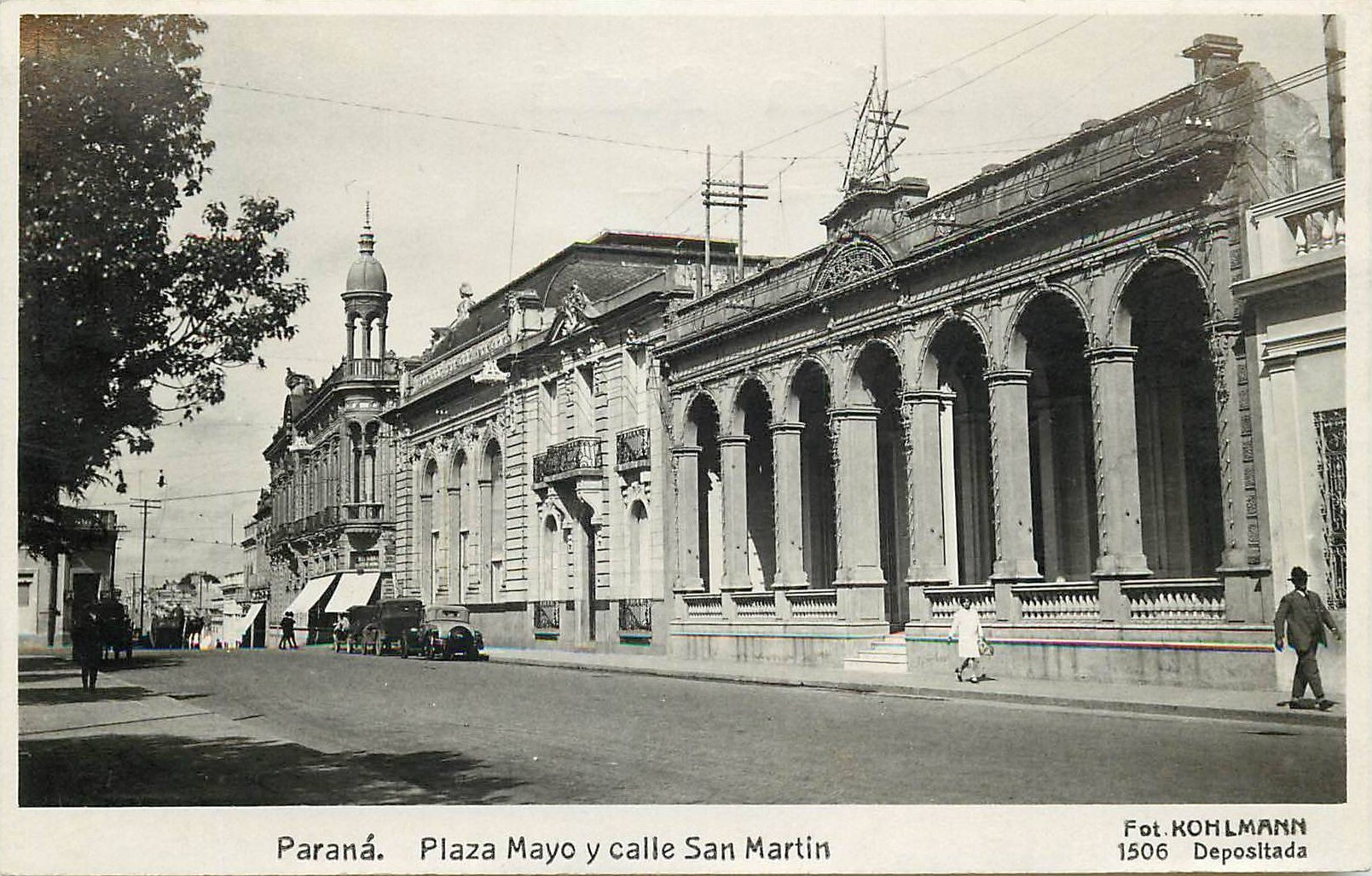 Calle San Martín frente a la Plaza 1 de Mayo, en Paraná (Argentina).